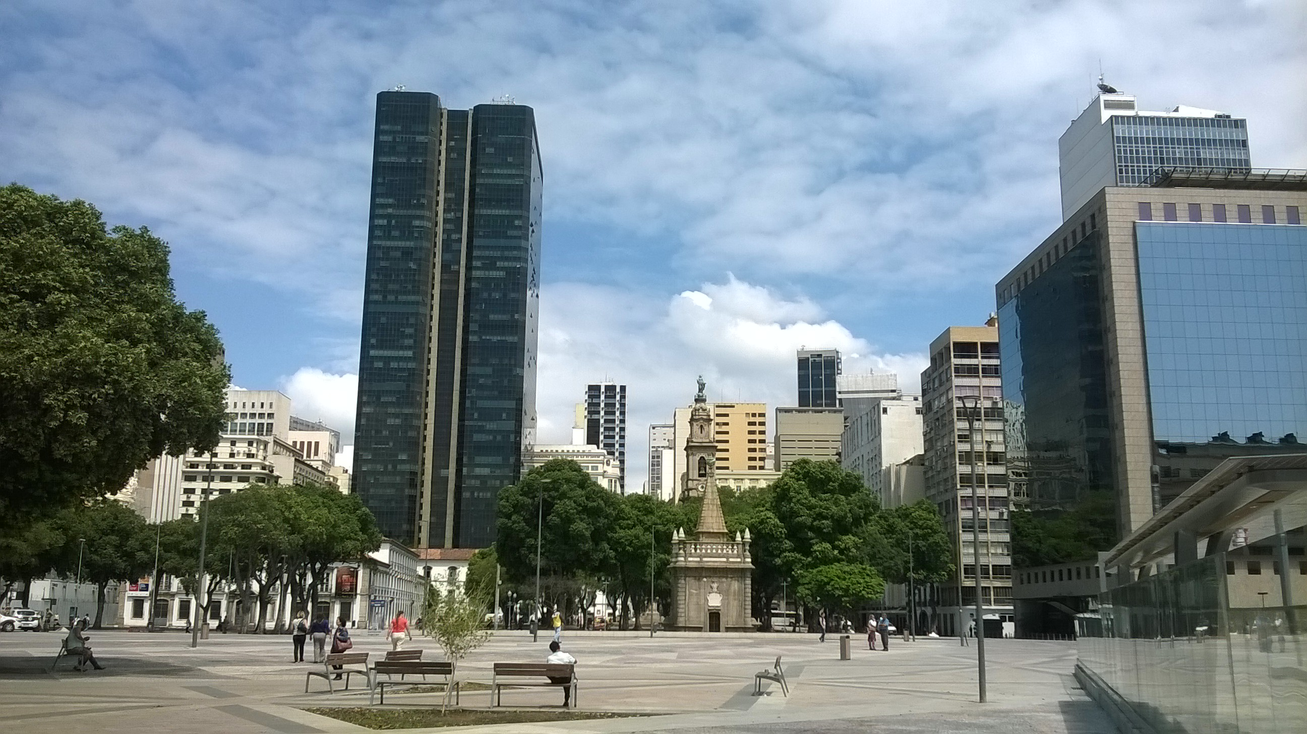 Praça XV de Novembro, Centro, Rio de Janeiro, RJ, Brasil, requalificada.